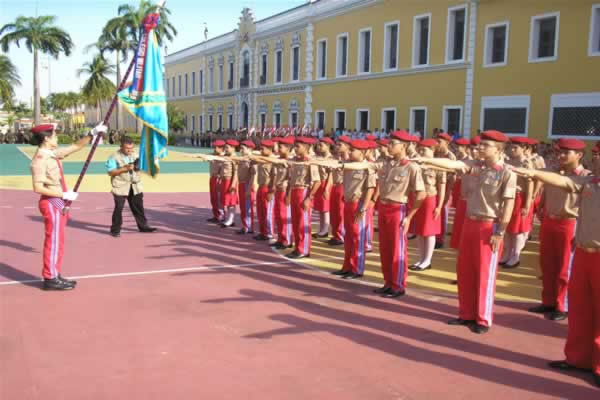 Formatura em frente do COlégio Militar de Fortaleza.